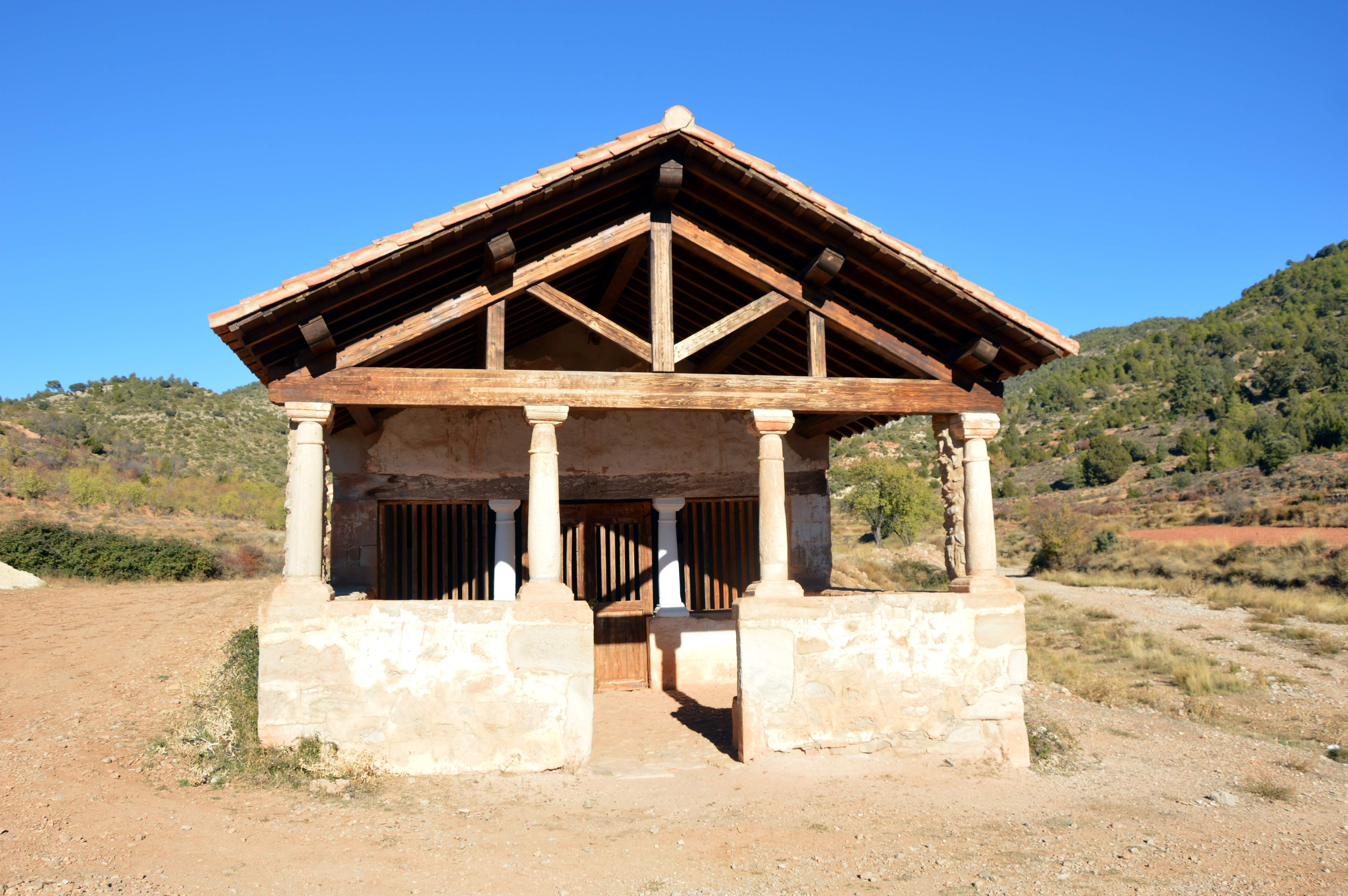 Vista frontal (meridional) de la Ermita de San Roque en Puebla de San Miguel (Valencia), 2017.